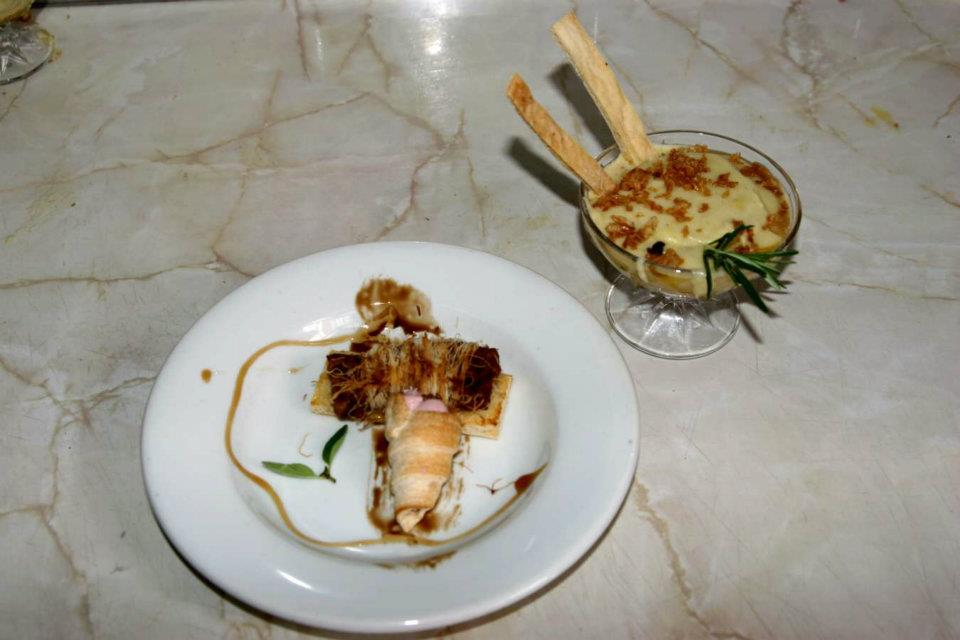 Tapas ganadoras de la ruta 2012